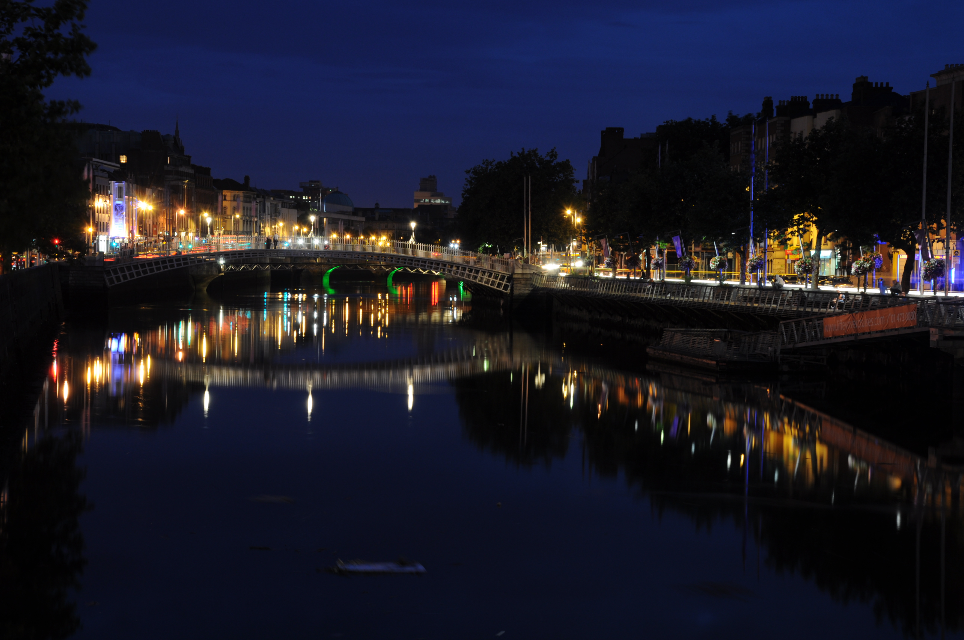 Dublin (Irland) in der Nacht